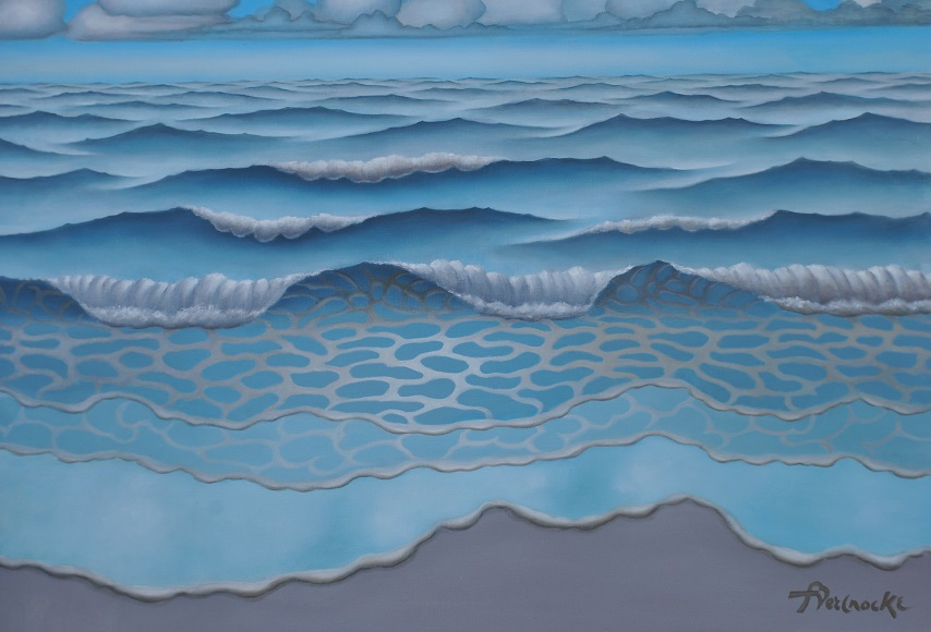 Ferdinand Vercnocke "Blauwe Marine"